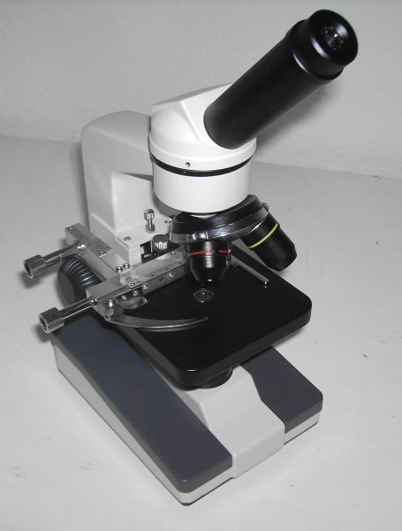 Lichtmikroskop der Marke Bresser